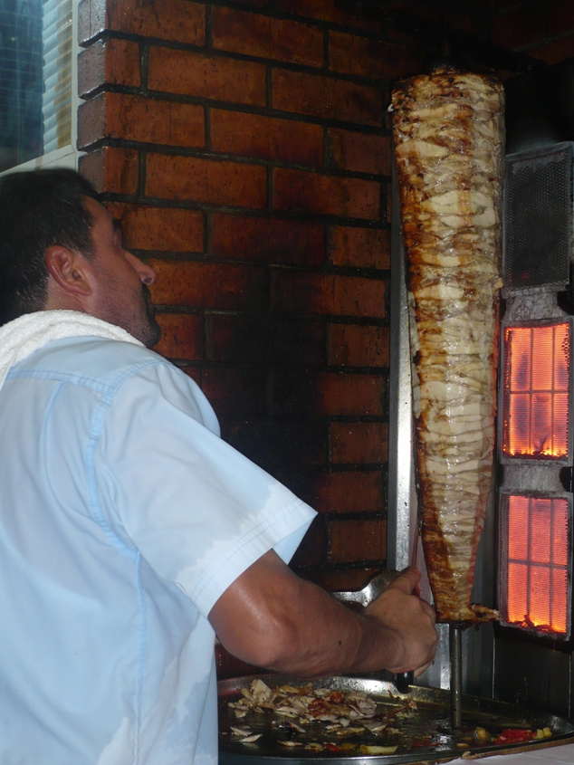 ഷവർമ തയാറാക്കാനായി വെന്ത ഇറച്ചി ചെറുതായി അരിഞ്ഞെടുക്കുന്നു